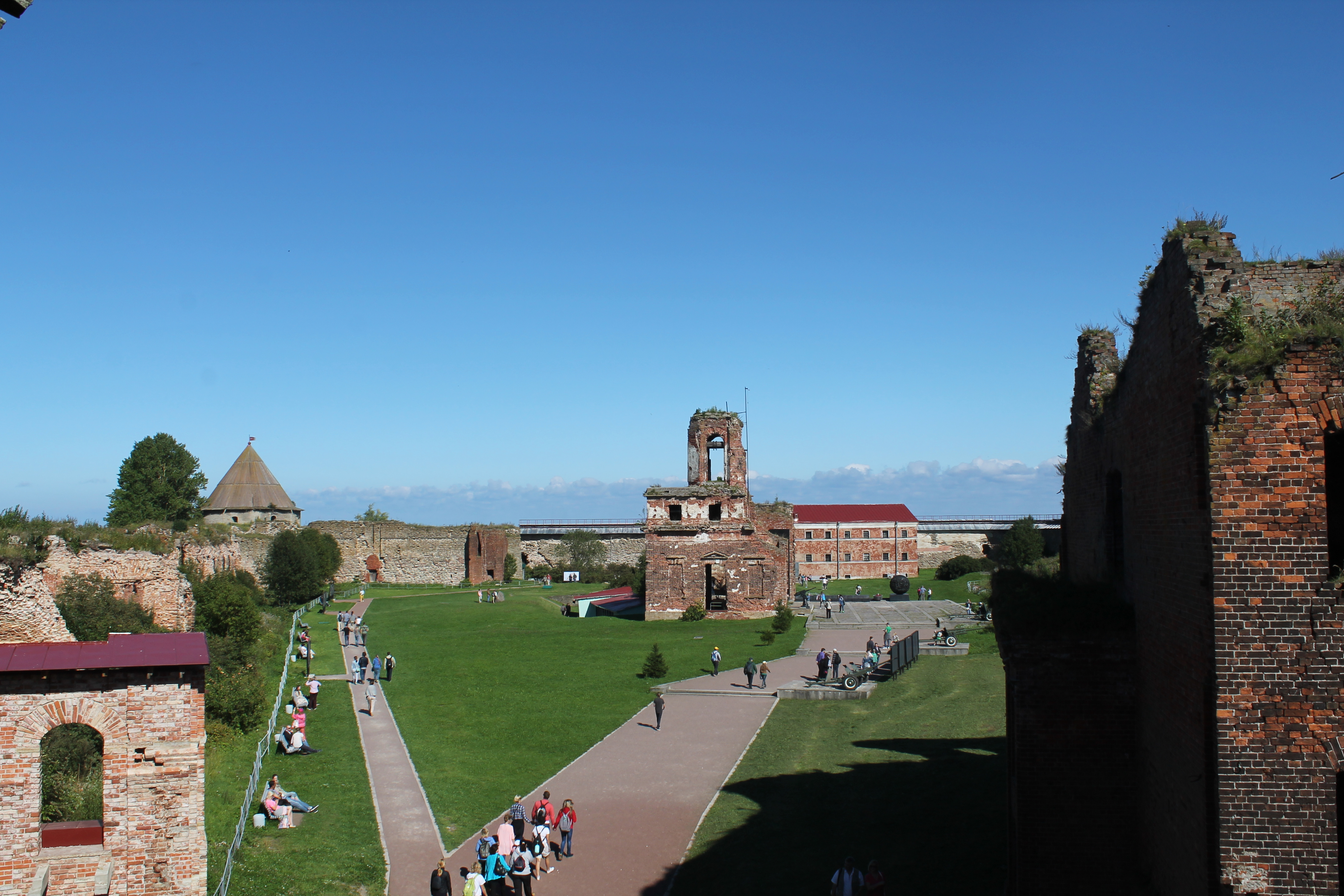 Ансамбль крепости "Орешек" (Шлиссельбургская крепость-тюрьма): в истоке р.Нева, остров Ореховый, Кировский район, Ленинградская область